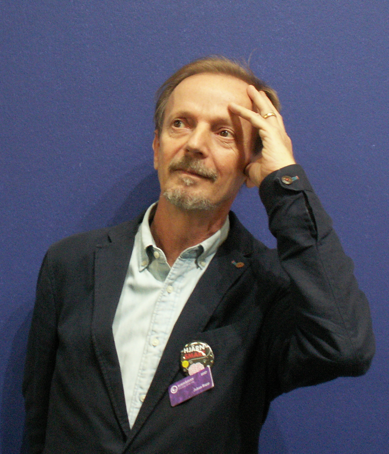 Johan Rapp, författare, journalist och ordförande för de Tankspriddas Riksförbund.